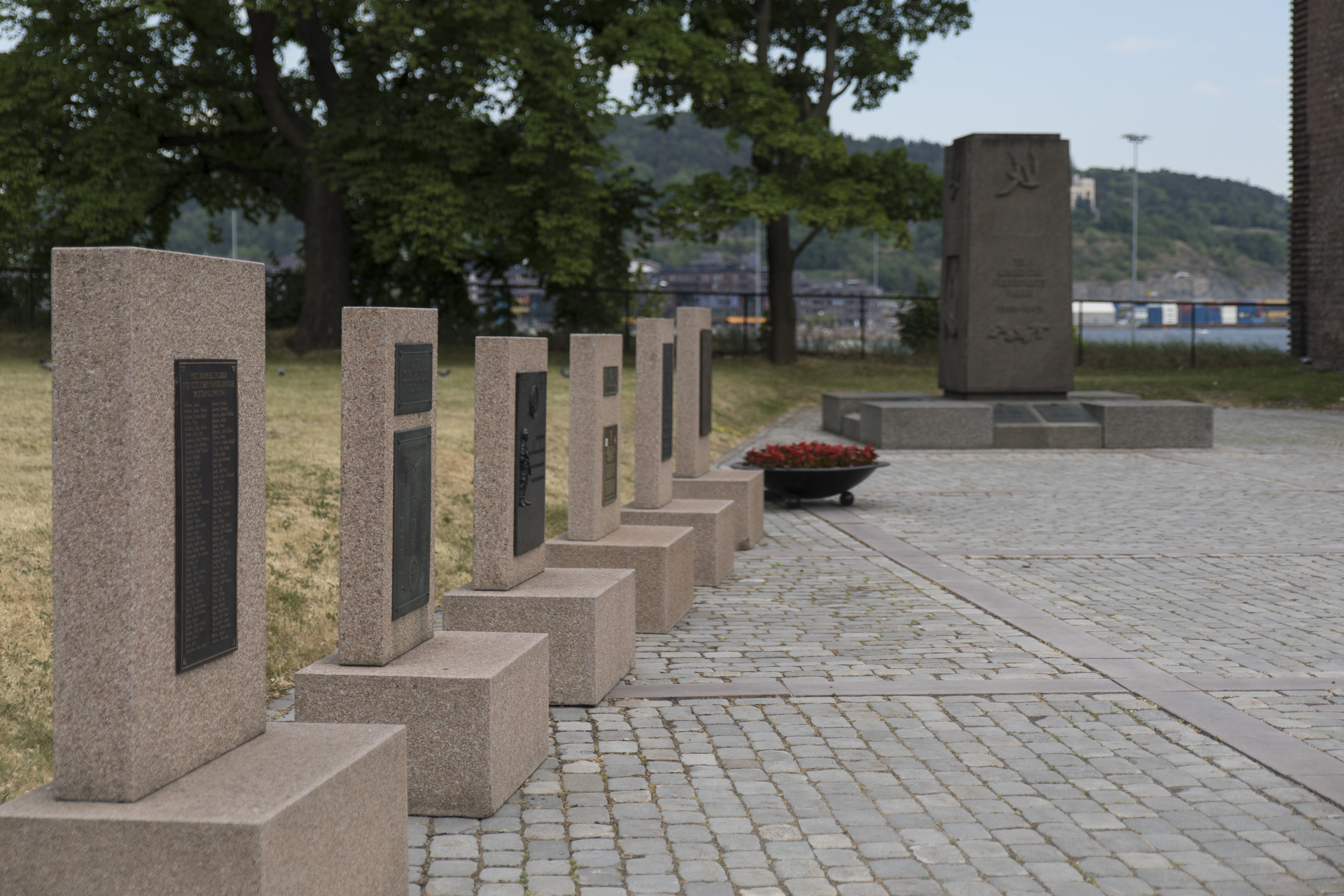 Minnesmerker over falne norske soldater, plassert utenfor forsvarsmuseet i Oslo